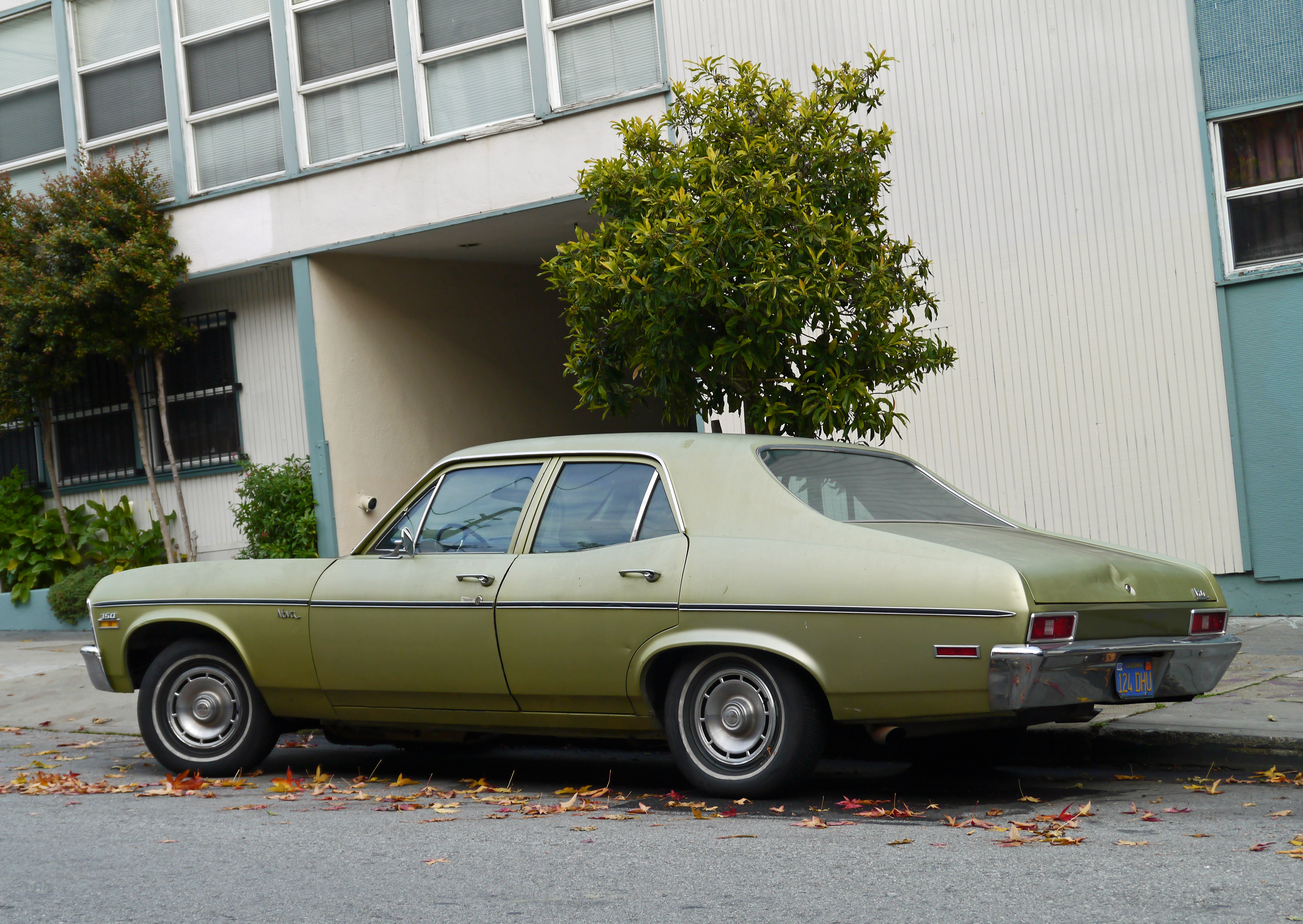 1969-1972 Chevrolet Nova 350 sedan. 350ci (5.7L) V8 engine.